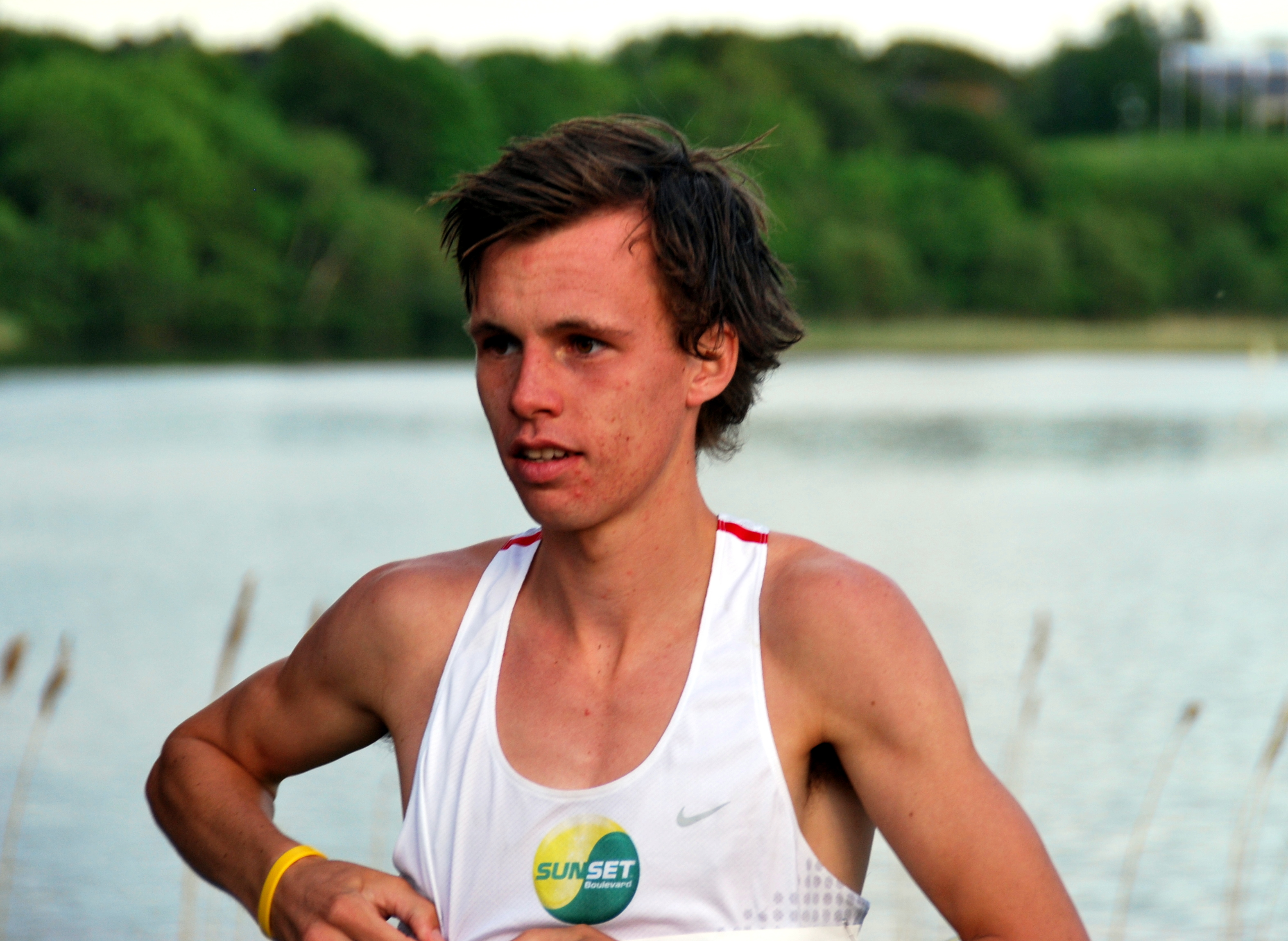 Thijs Nijhuis, dansk atlet. Her efter sejren i Søndersøløbet 2012 i Viborg.